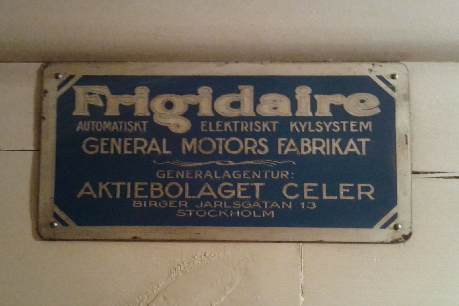 Frigidaire Kylskåp på Hallwylska museet